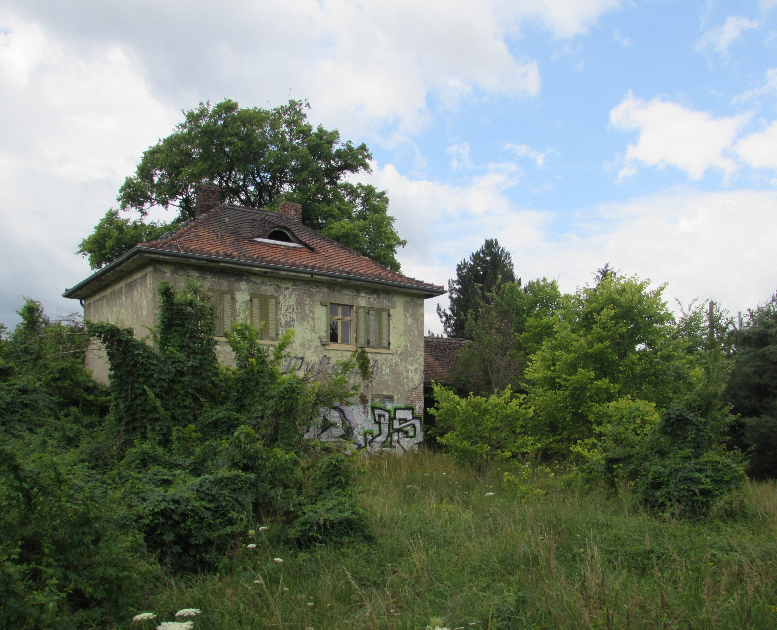 bahnhof wusterwitz, kleinbahn wusterwitz - görtzke